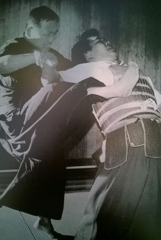 高木流柔術 膝車